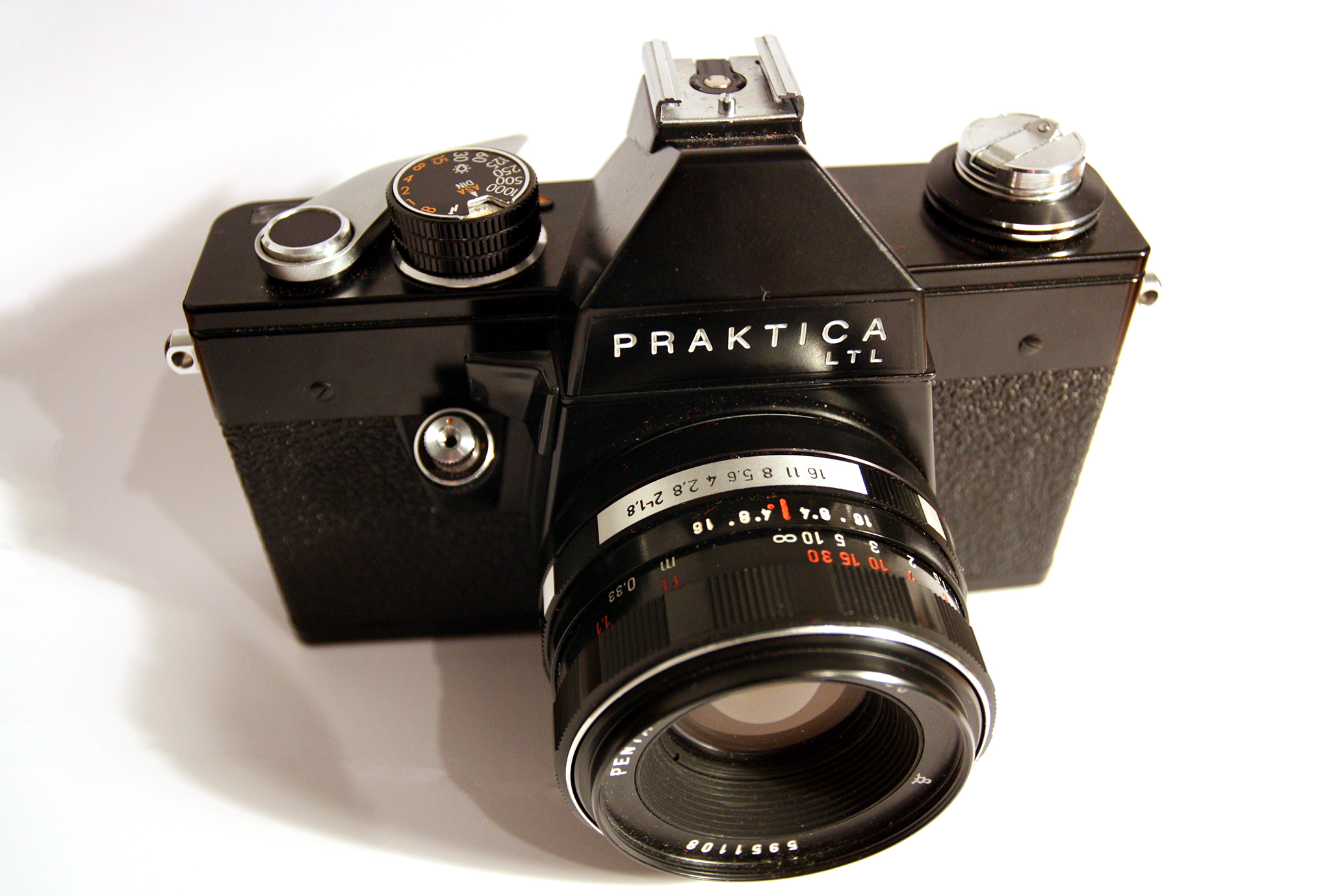 Schwarze Variante der Praktica LTL mit dem Standard-Objektiv Pentacon 1:1,8/50mm.